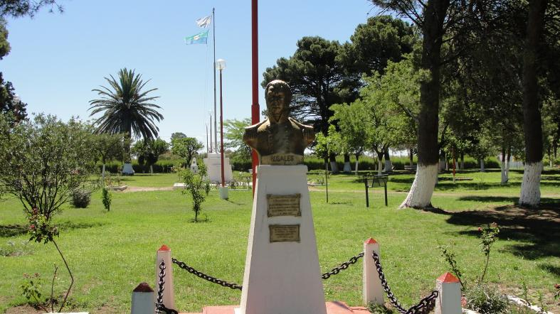 plaza de villa general arias